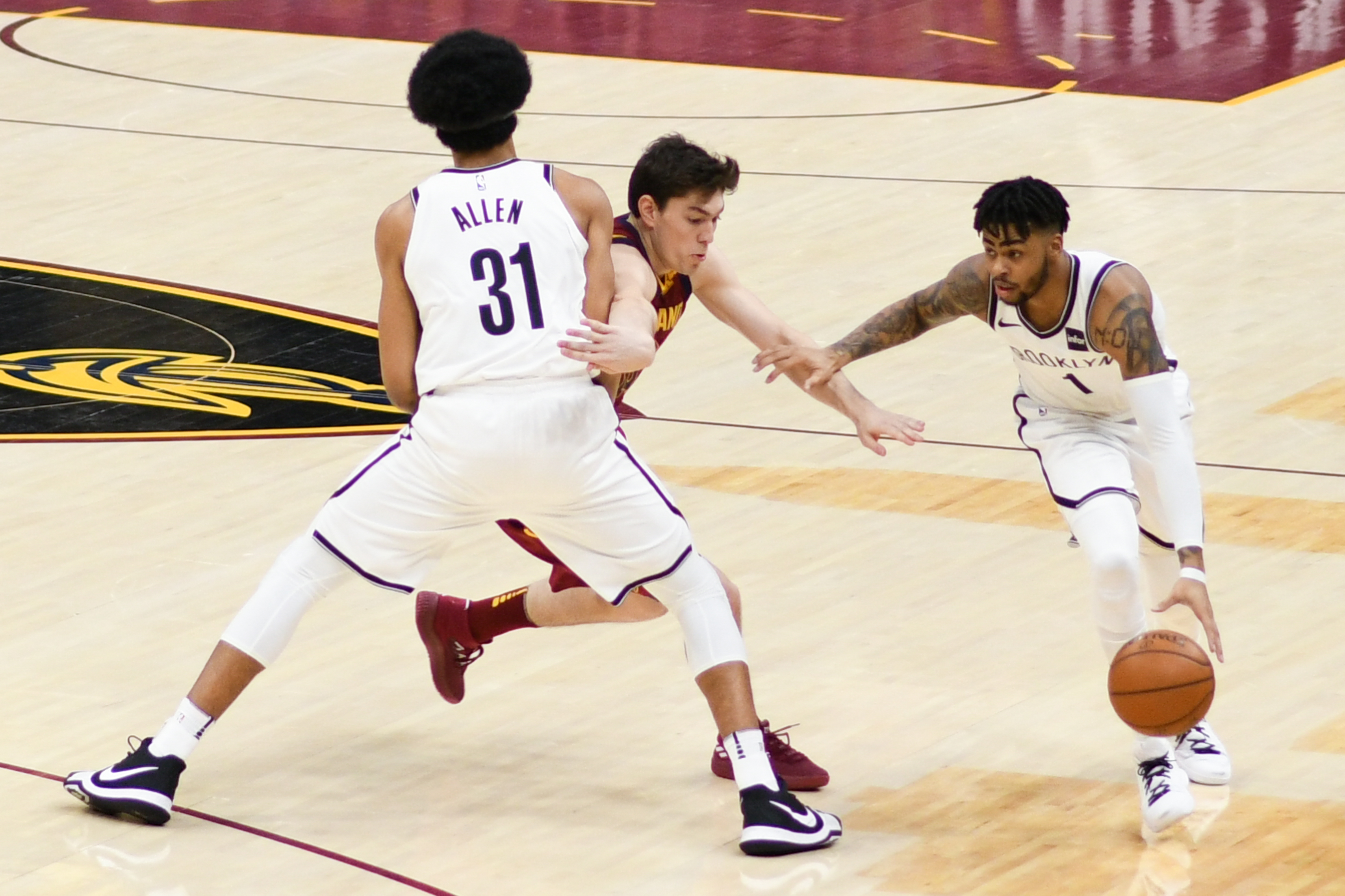 Cedi Osamn